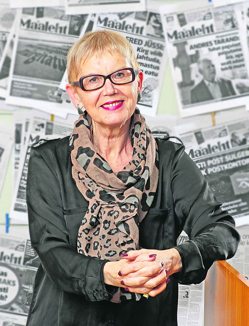 Erika Klaats